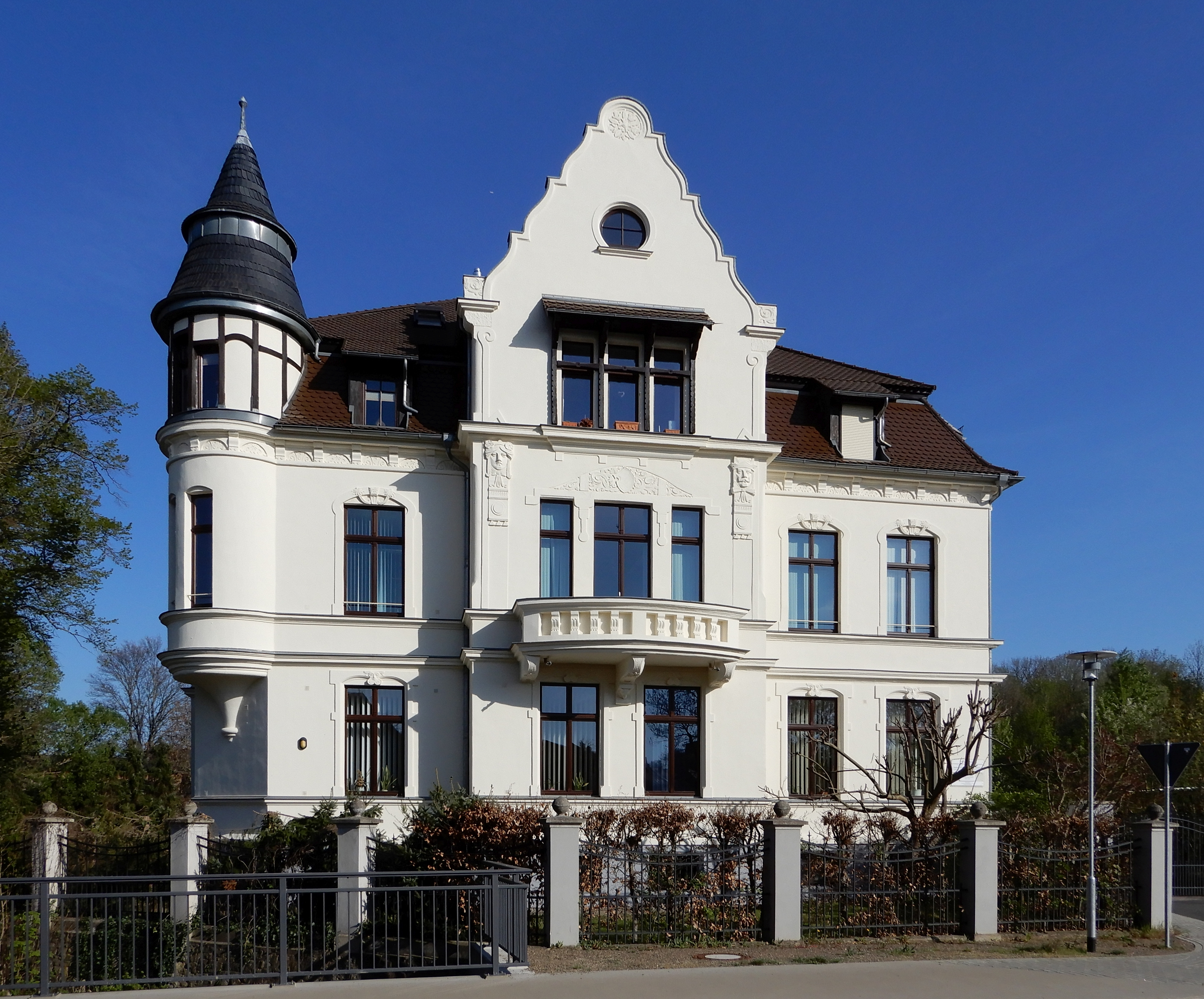 Villa Baumgartenstraße 2 in Aschersleben